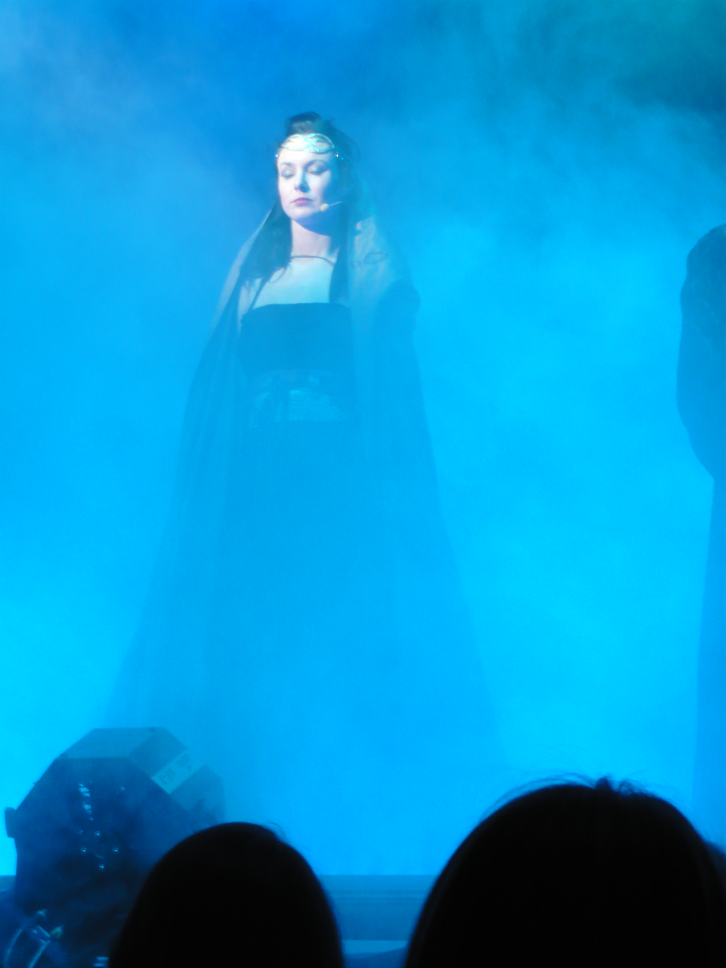 Gregorian und Amelia Brightman live im Konzerthaus Freiburg